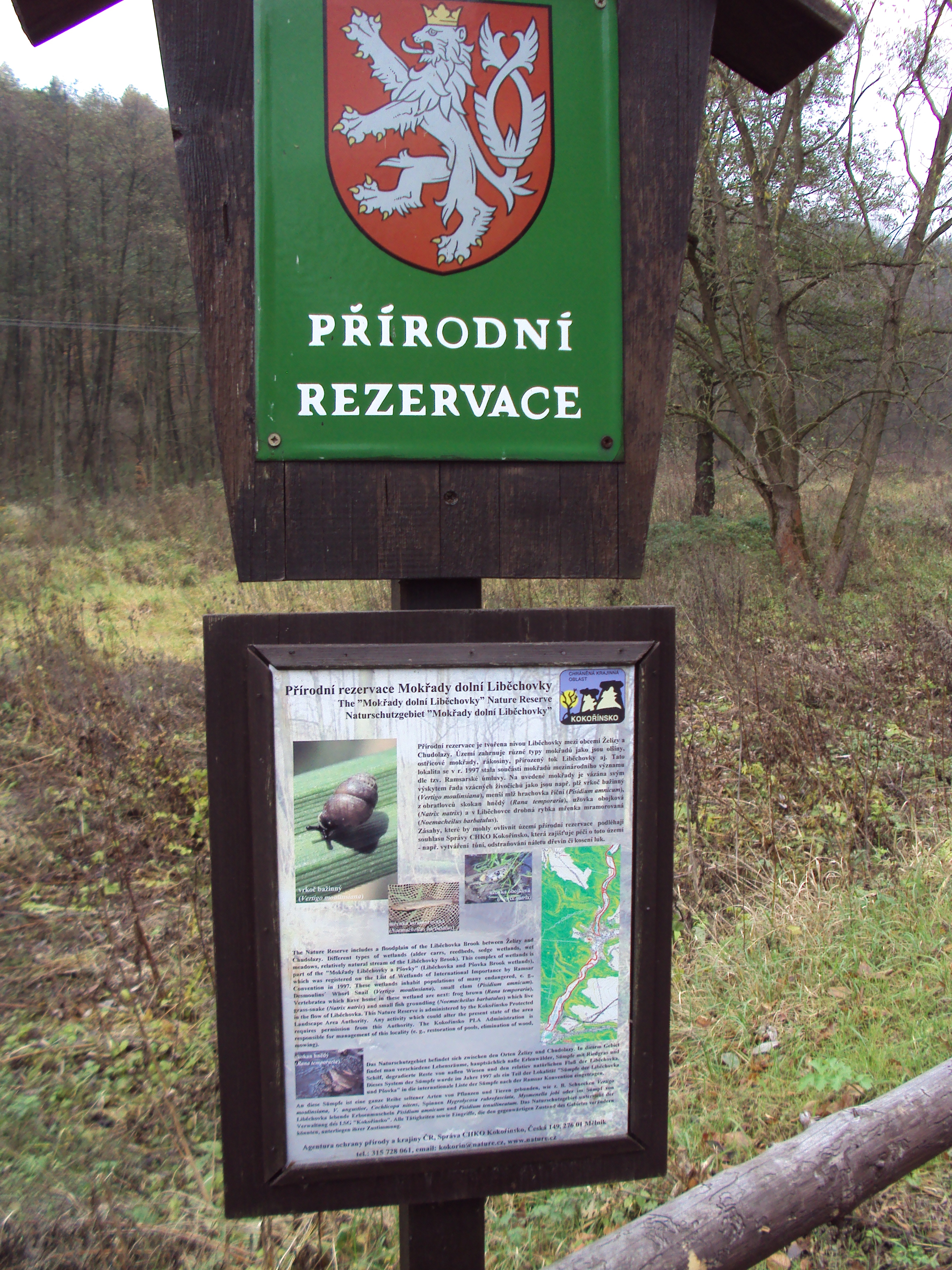 Označení PR Mokřady dolní Liběchovky v CHKO Kokořínsko